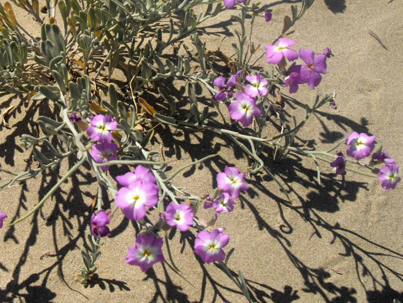 Malcolmia littorea